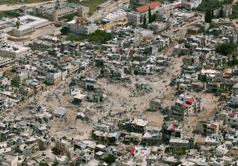 ג'נין בחומת מגן